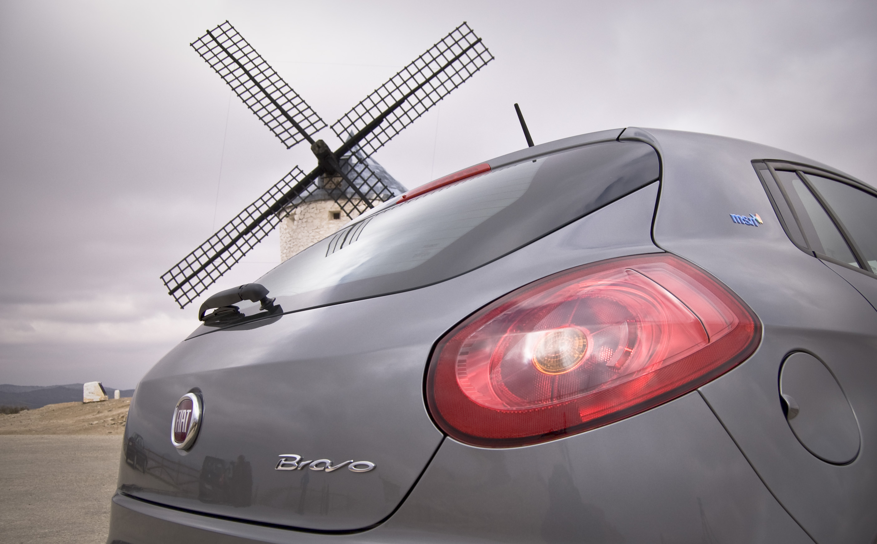 Fiat Bravo prueba y "photoshoot" en los molinos de viento de Consuegra (Toledo). Prueba en Diariomotor